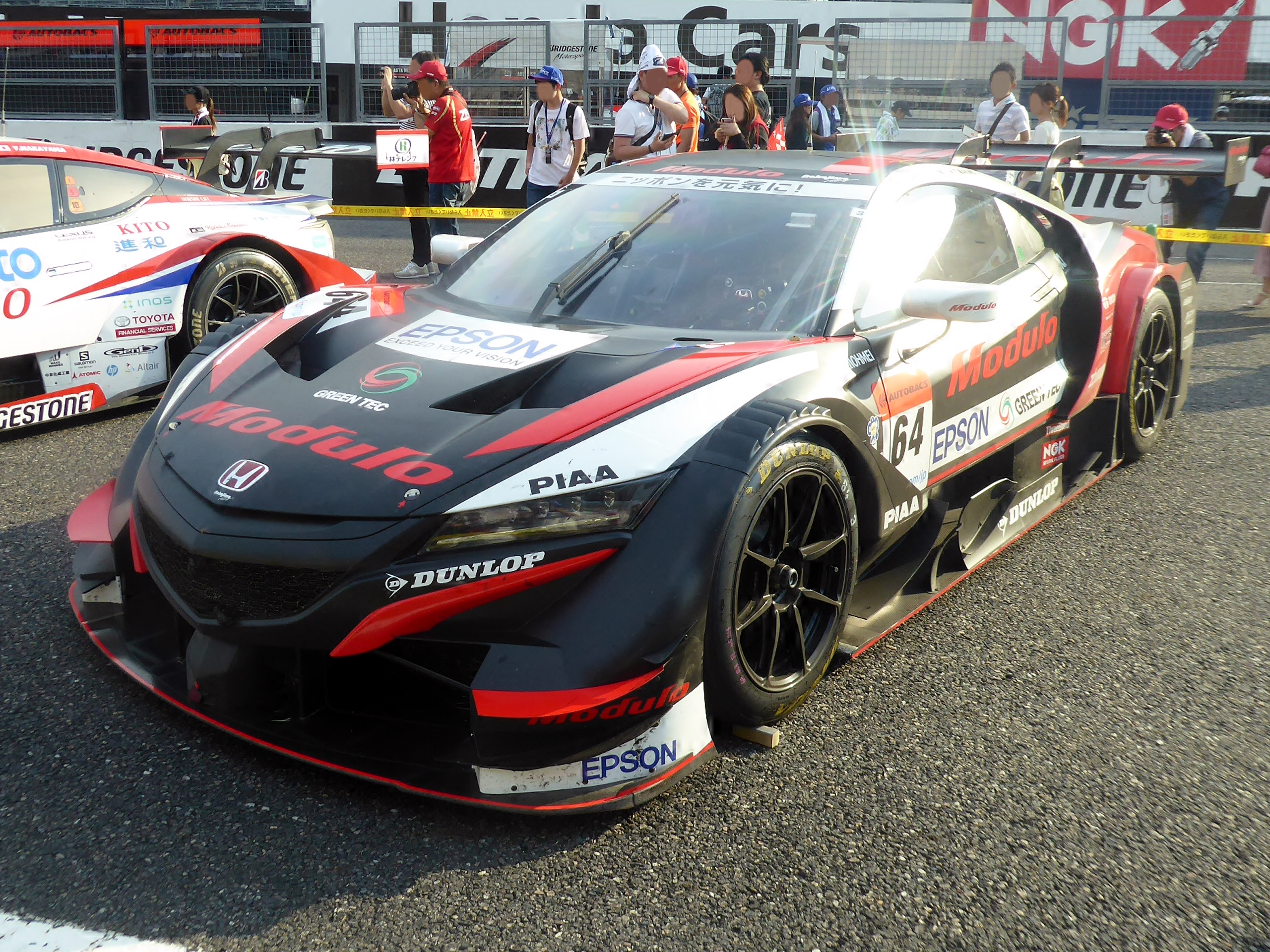 2019年鈴鹿GT300km終了後の64号車Modulo Epson NSX-GTを撮影。